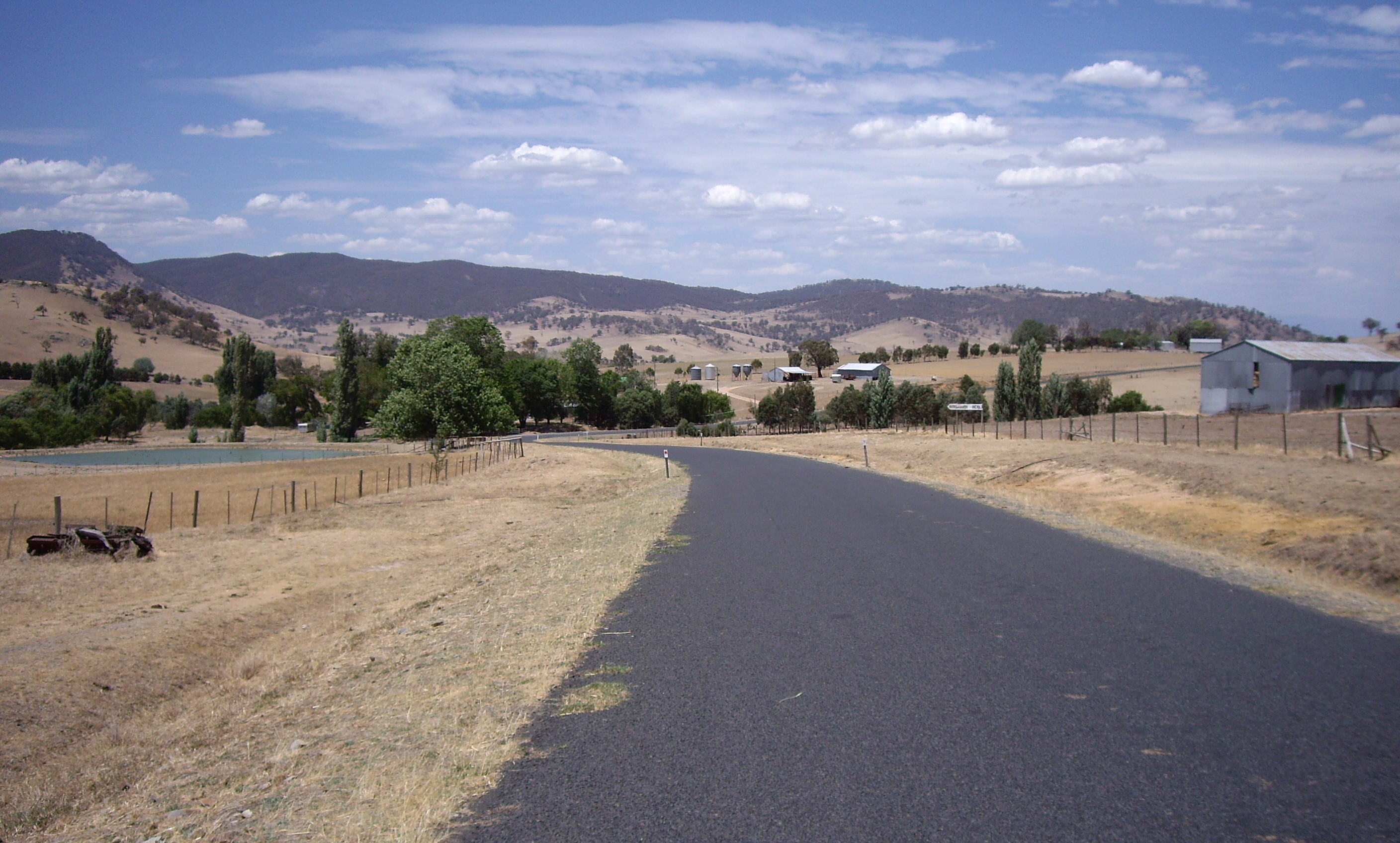 Ournie